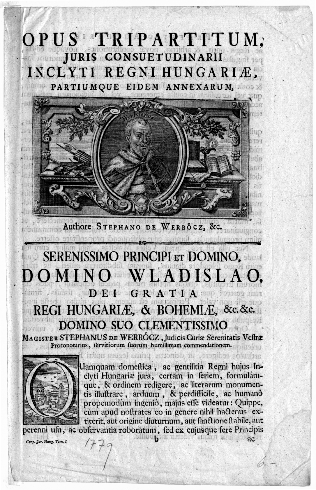 Werbőczy István 1779-es kiadású Opus Tripartitum / Nemes Magyarország Szokásjogának Hármaskönyve című művének címoldala